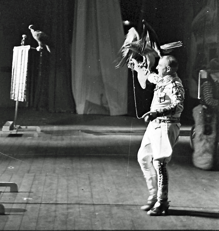 Plaza (Berlin): Billy Jenkins mit seinen Vögeln